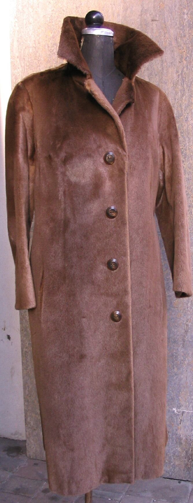 Ariranha-Ottermantel (südamerikanischer Riesenotter), Pteronura brasiliensis, (Gmelin), (inzwischen voll geschützte Art)) aus 5 Fellen, naturfarben, 110 cm lang, ca. 30 Jahre alt (aus ca. 1967), Hersteller Schommertz Pelze, wahrscheinlich Bonn